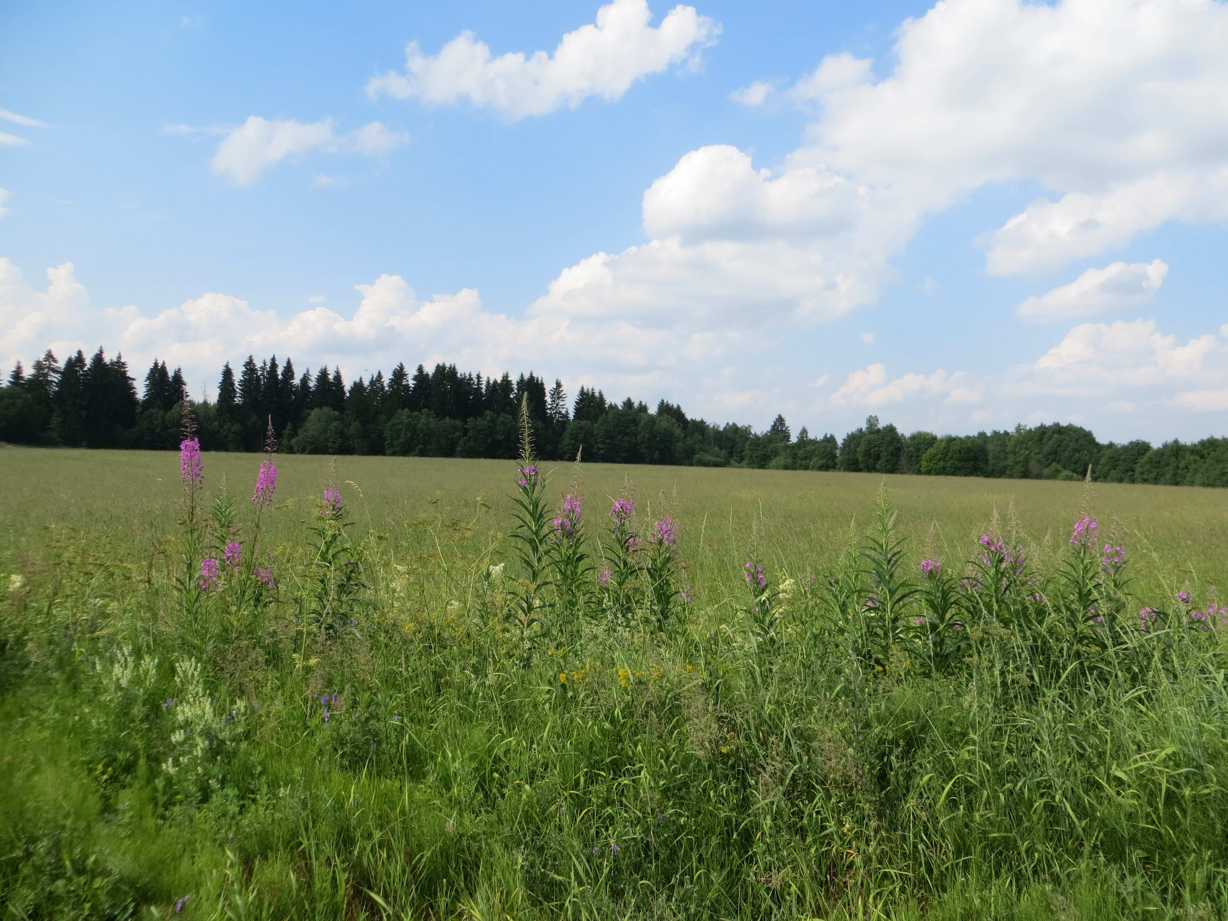 Поле перед деревней Пеньково.